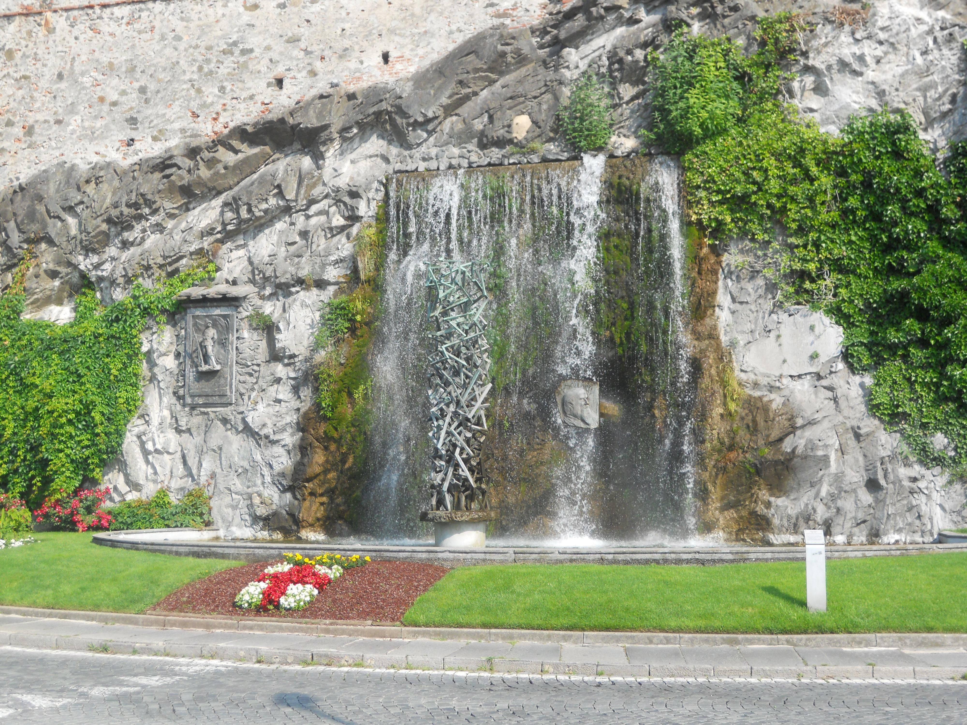 Fontana dedicata ad Adriano Olivetti